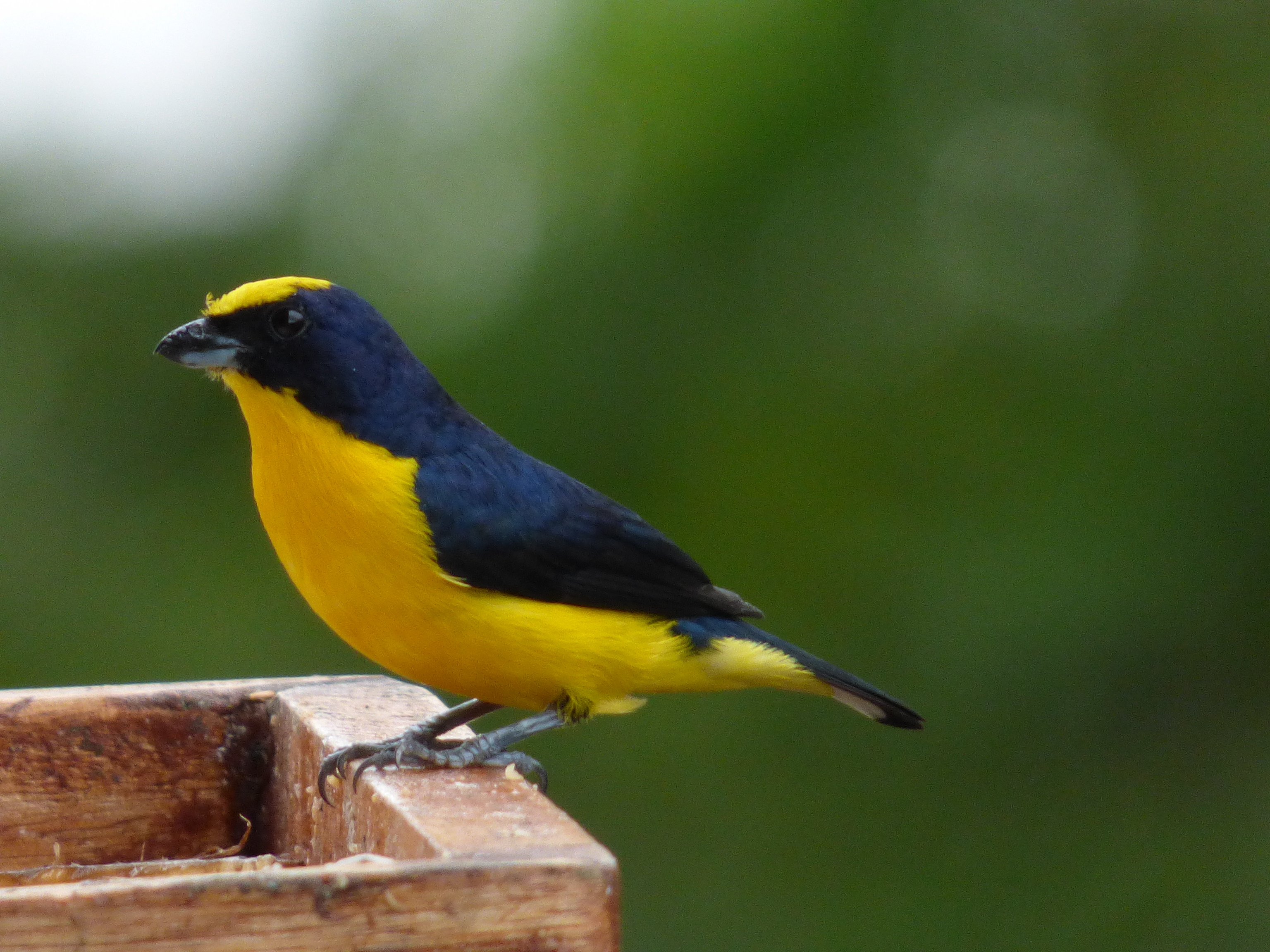 Foto tomada en mi casa de Armenia (Quindío)